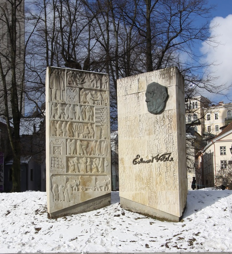 Eduard Vilde monument Tallinnas Harju tänaval. Foto: E. Kangor